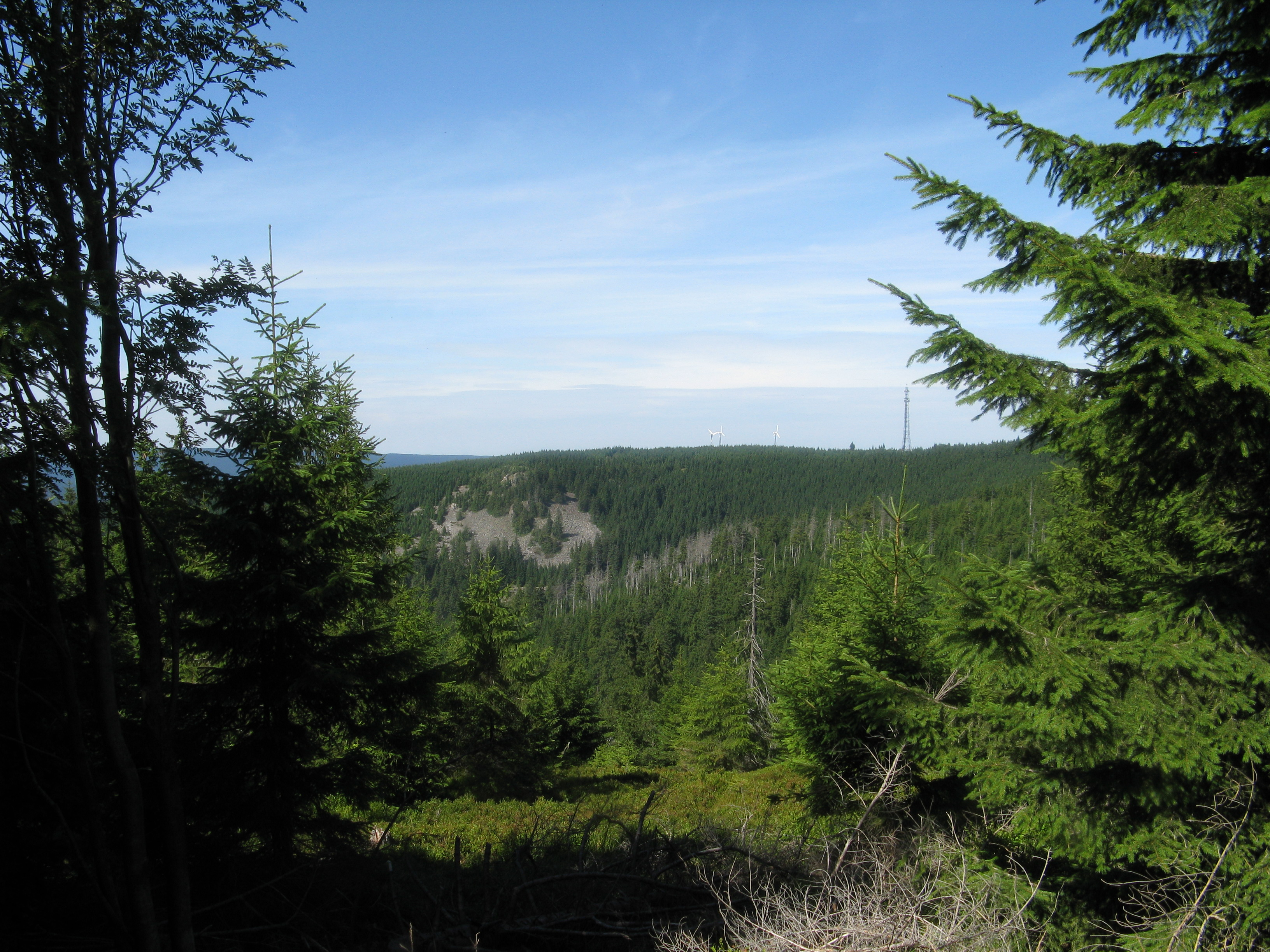 Hammerstein-Klippen auf dem Acker